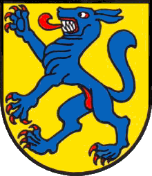 Wappen der politischen Gemeinde Lupsingen, Schweiz